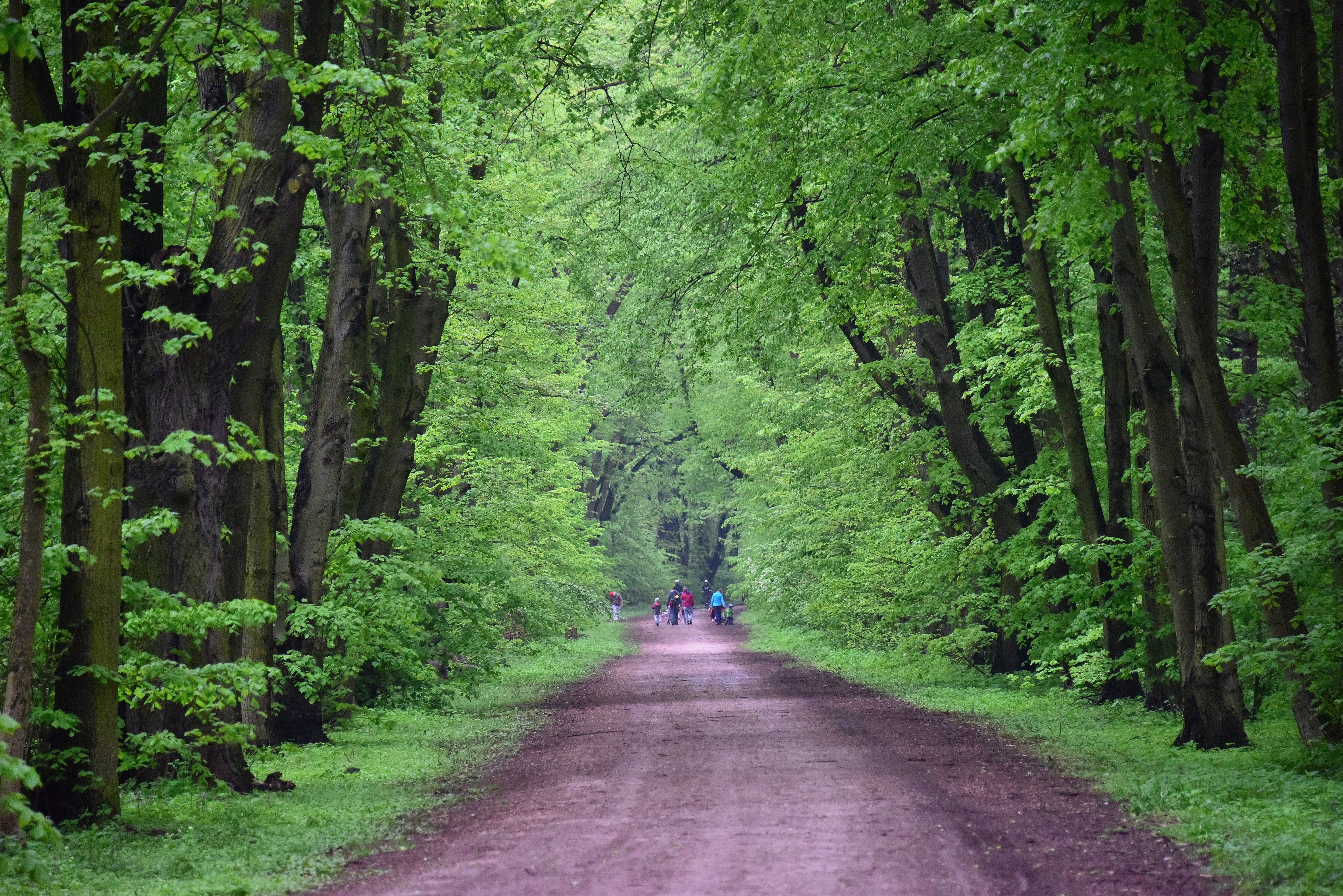 Las Młociny (park Młociński) w Warszawie